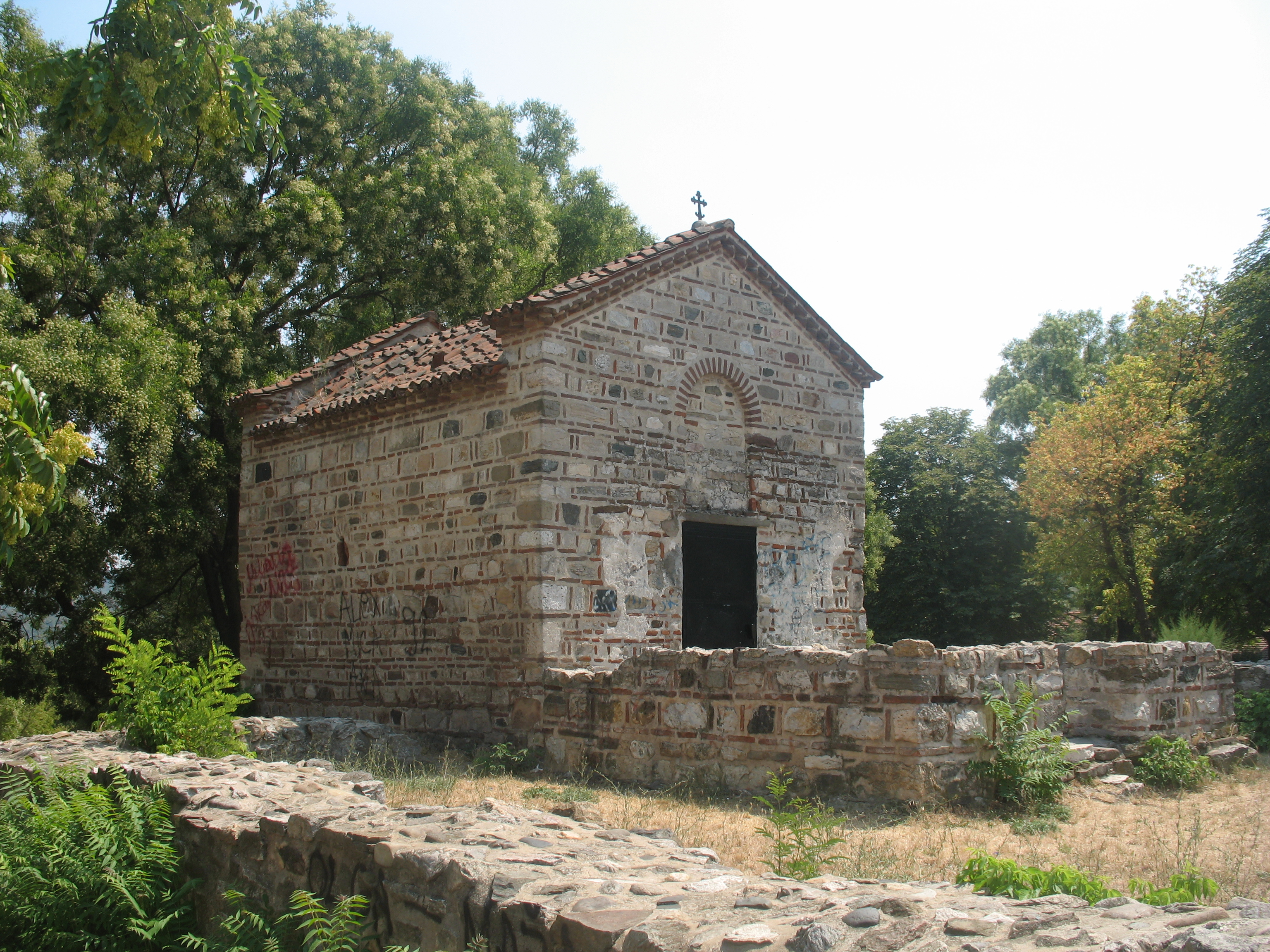 "Latin" church in Prokuplje